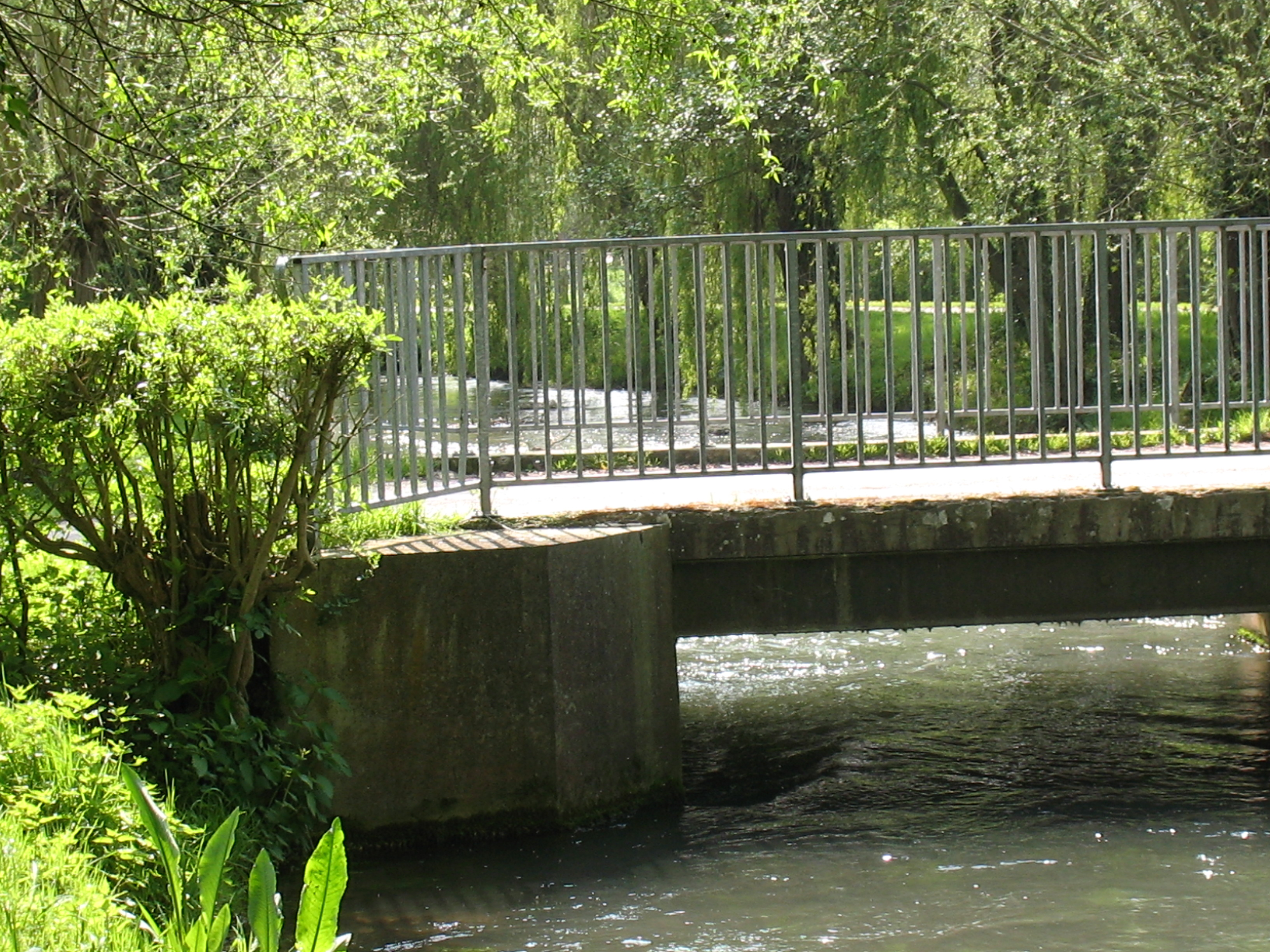 Querrieu (Somme, France)